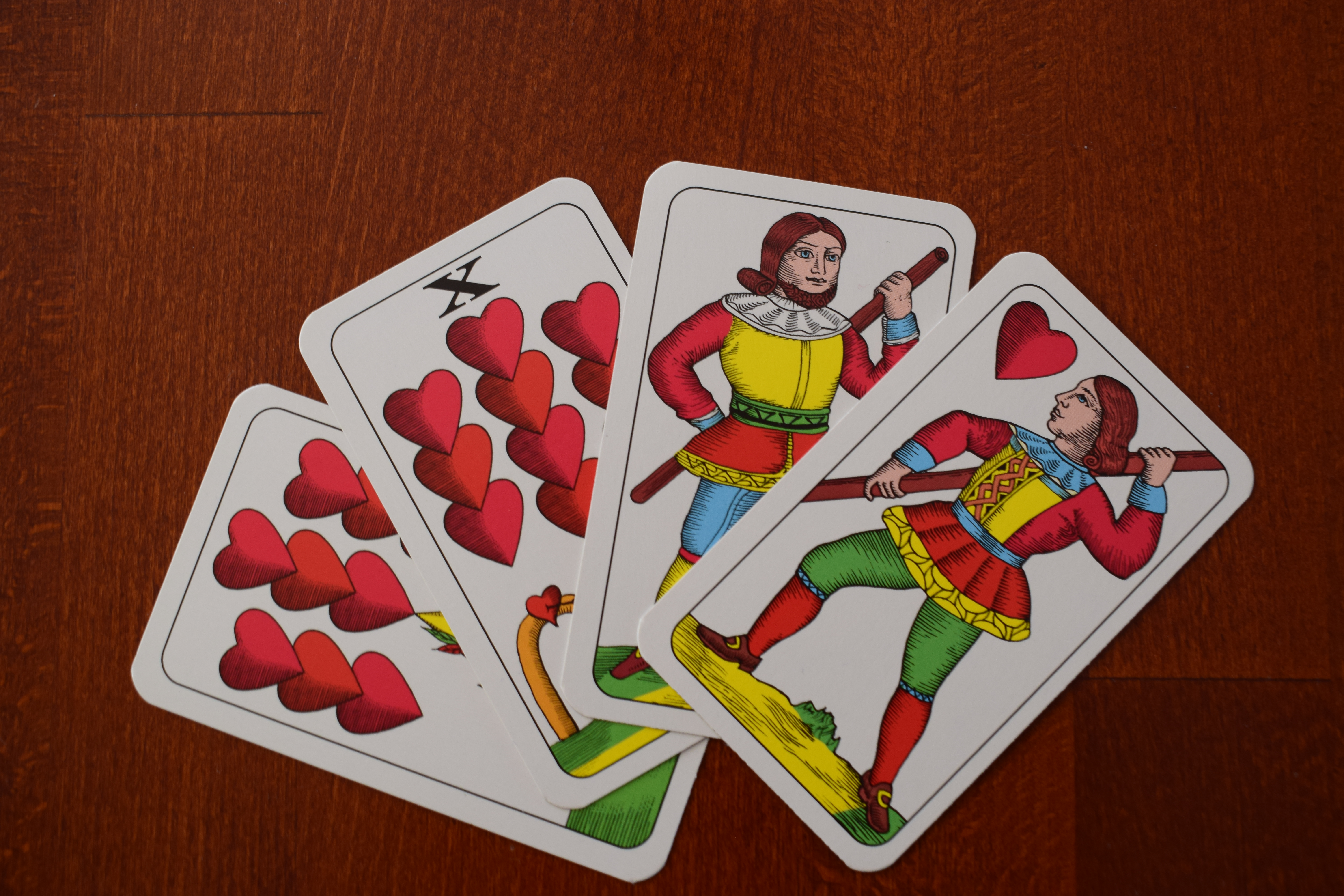 padesát cenzr